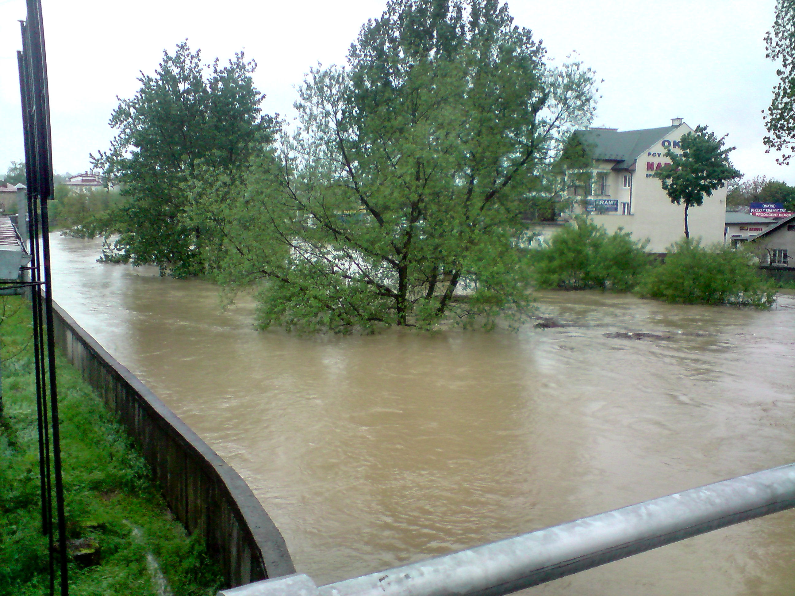 Rzeka Jasiołka, przekroczony stan alarmowy, 17 maja 2010, godzina 08:24. Widok z mostu na ulicy Kazimierza Wielkiego w Jaśle.